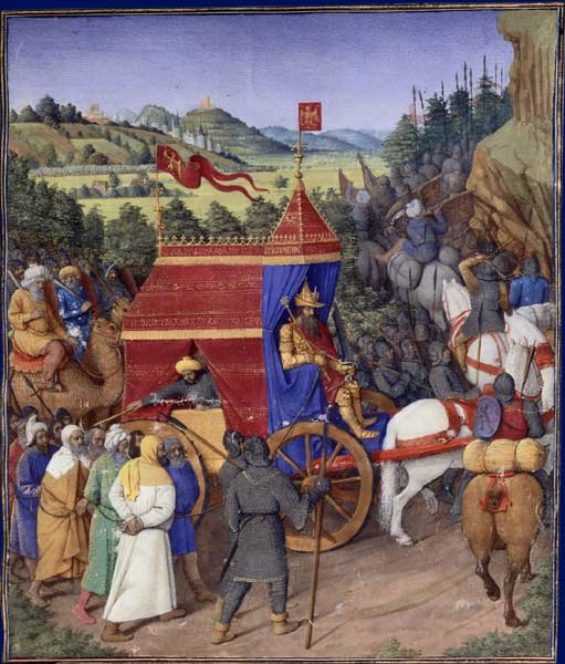 Triomphe de Josaphat, Flavius Josèphe, Les Antiquités judaïques, enluminure de Jean Fouquet, vers 1470-1475 Paris, BnF, département des Manuscrits, Français 247, fol. 194 (Livre IX) Josaphat, roi de Juda, rentre triomphalement à Jérusalem après sa victoire sur Adad, roi de Syrie.